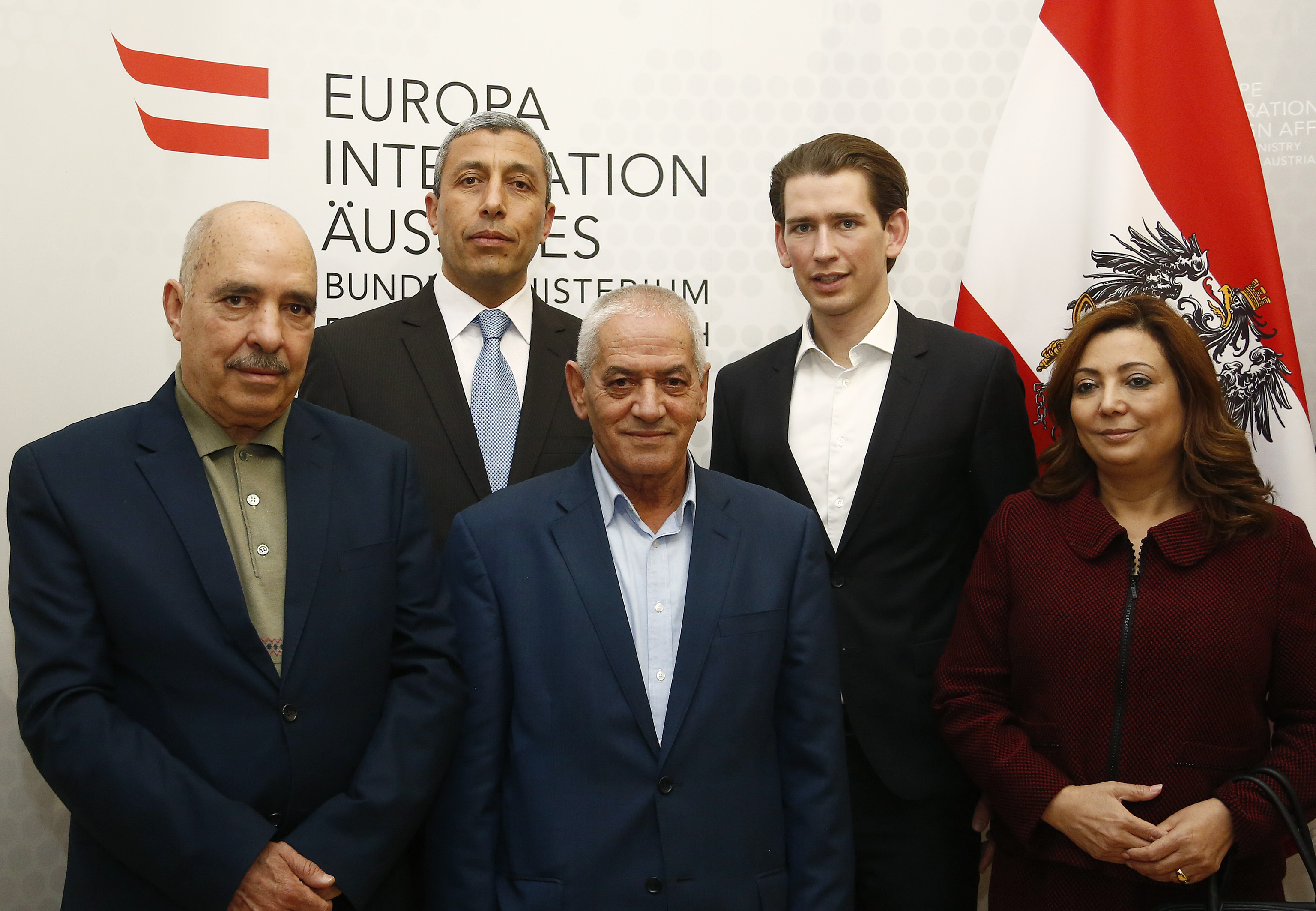 Treffen mit den tunesischen Friedensnobelpreisträgern. Wien, 29.02.2016, Foto: Dragan Tatic